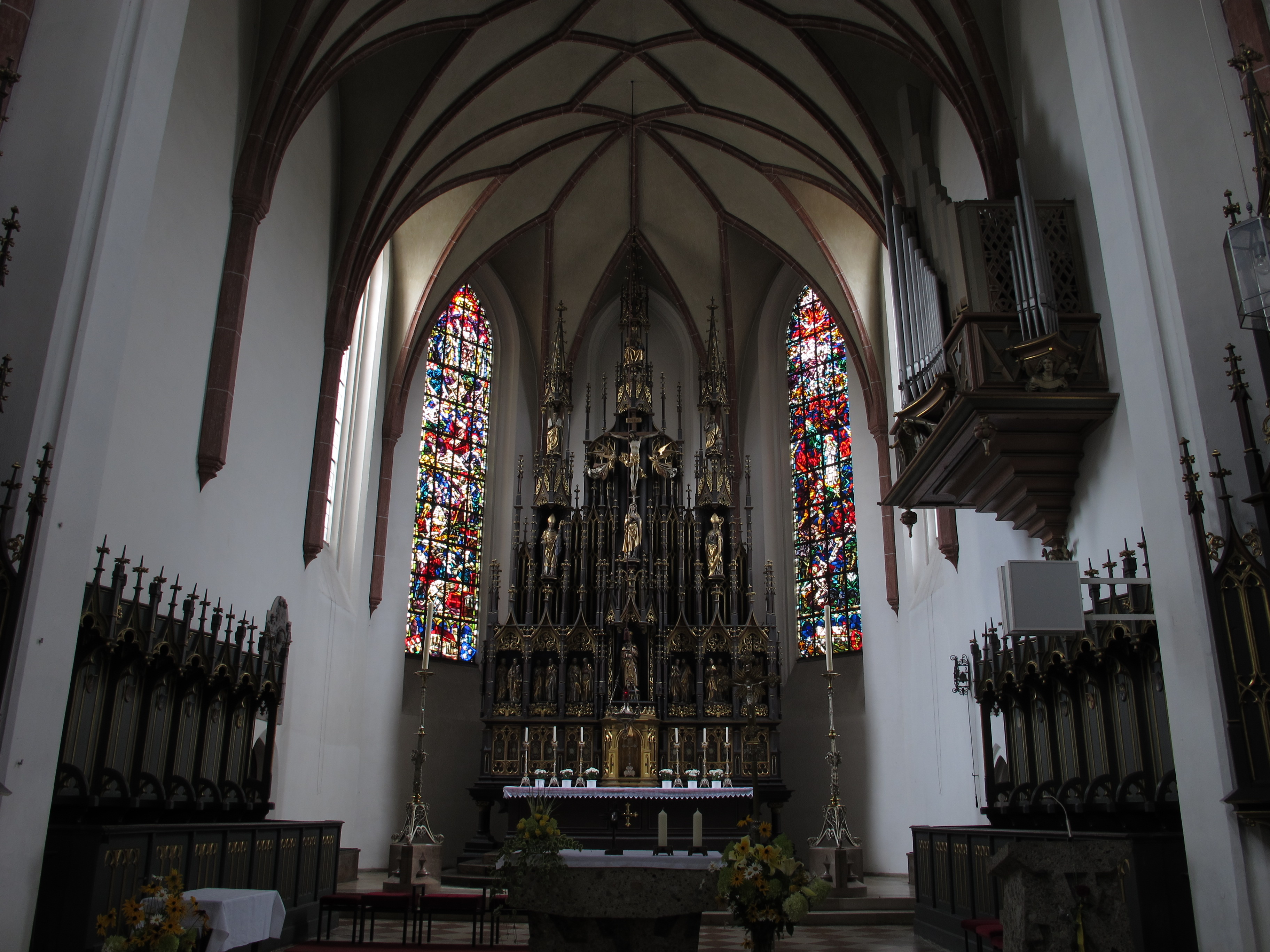 Pfarrkirche Sankt Jakob (Burghausen): Altar